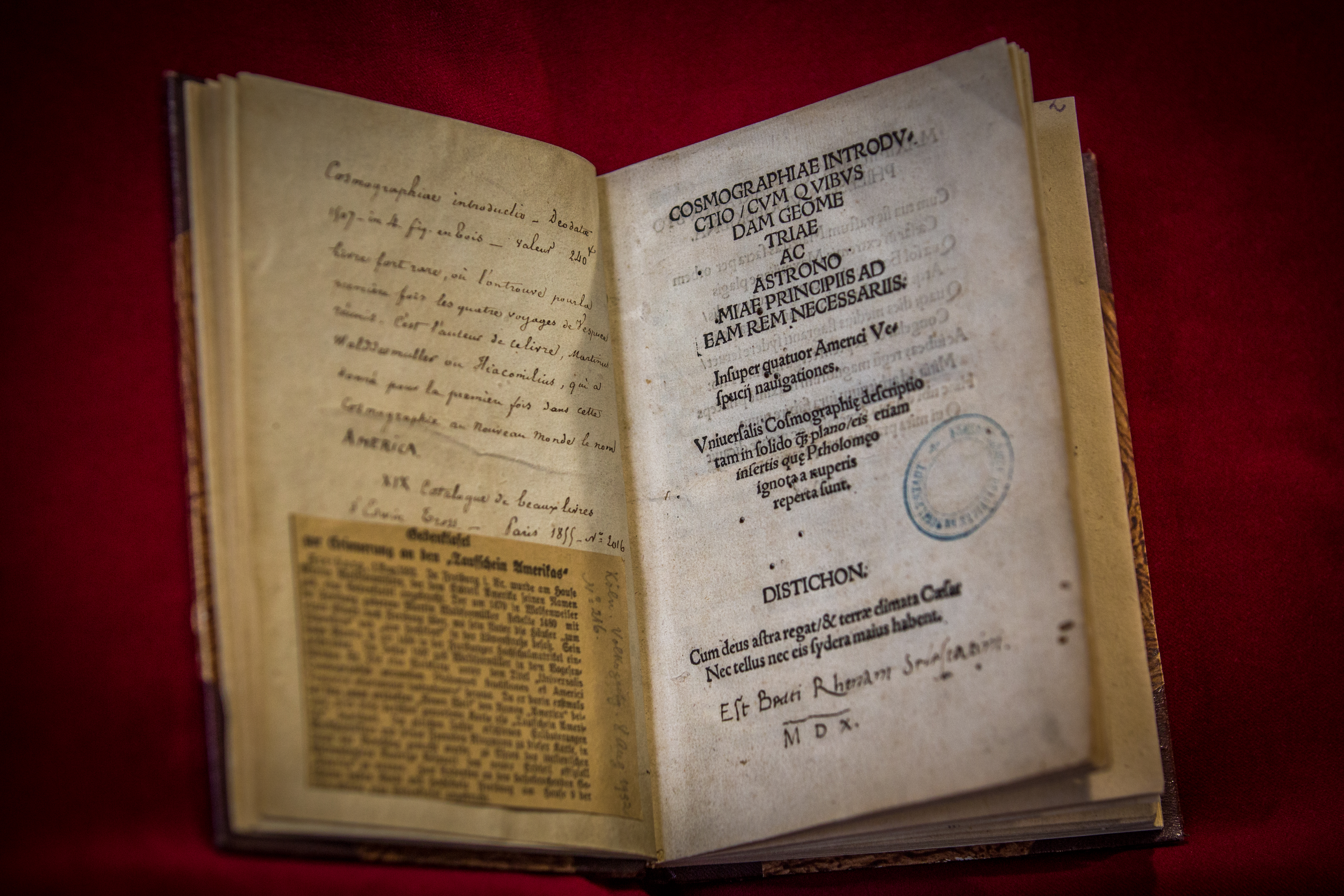 Cosmographiae Introductio Coll. Bibliothèque humaniste de Sélestat.